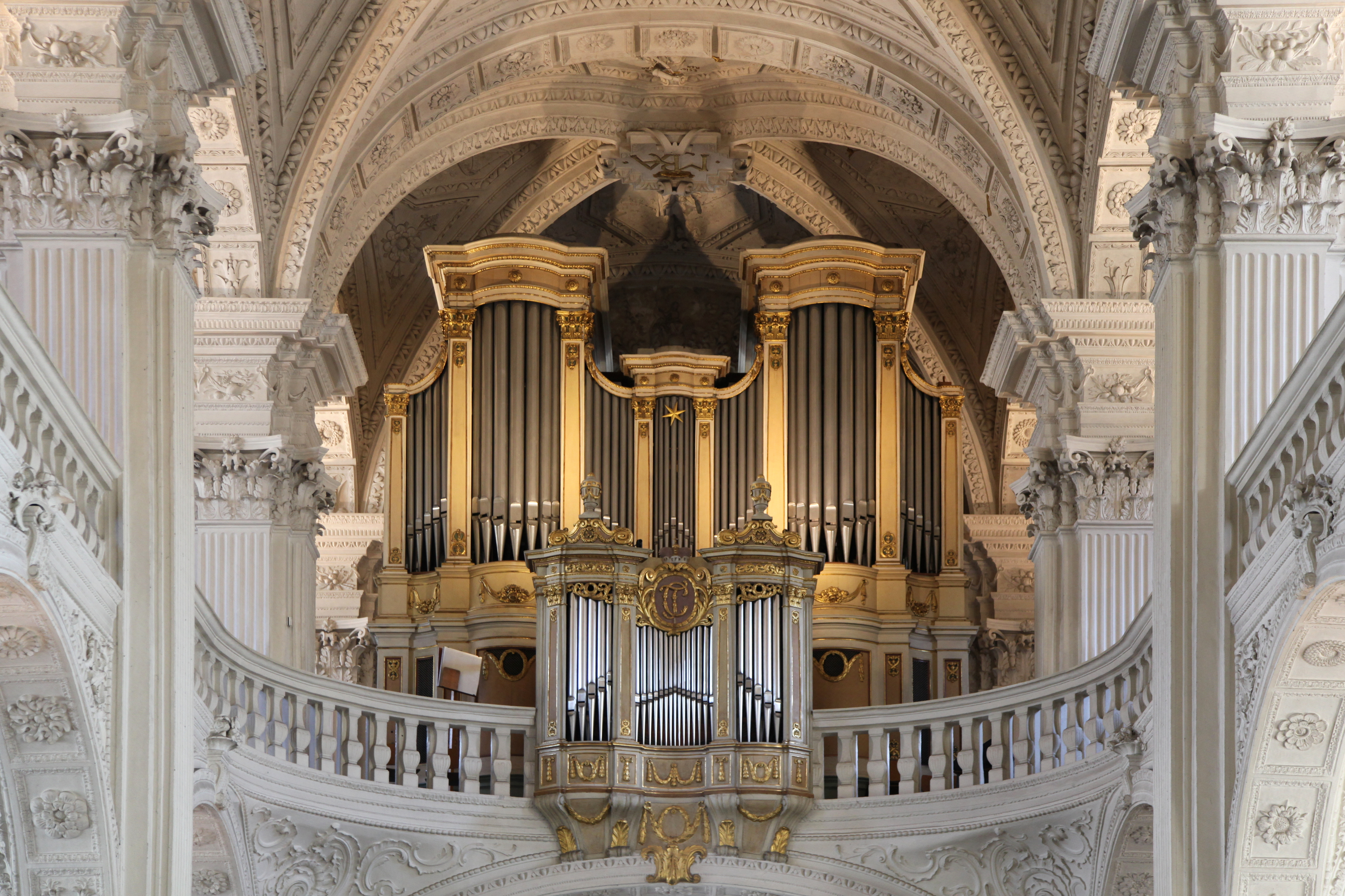 St. Andreas, Andreasstraße in Düsseldorf